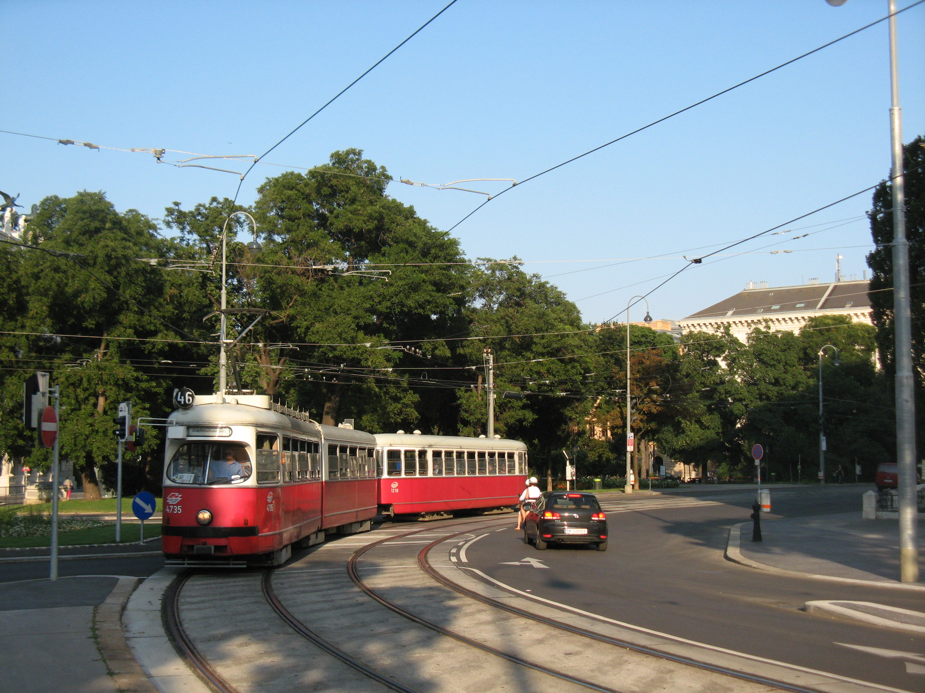 Straßenbahnlinie 46 am Schmerlingplatz, Wien-Innere Stadt